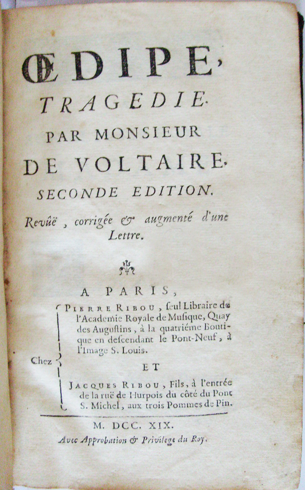 2e édition de la pièce de théâtre Oedipe de Voltaire chez Ribou en 1719